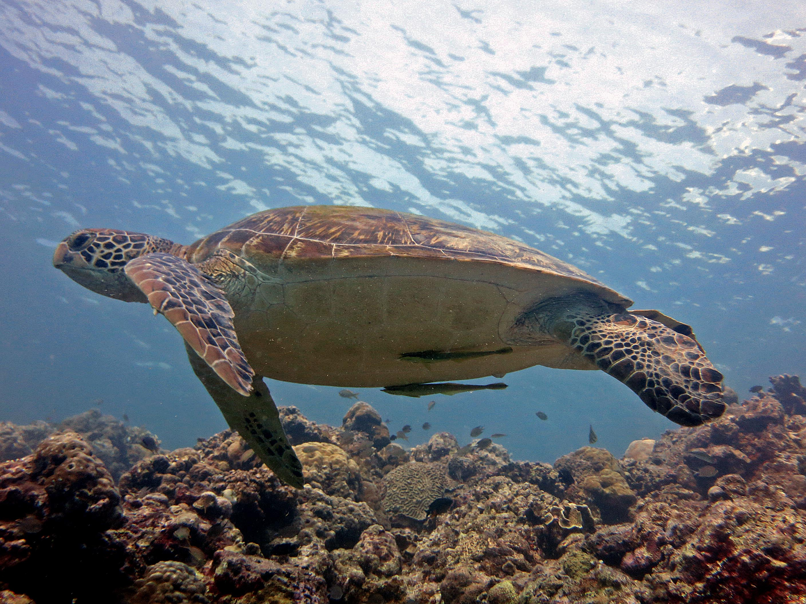 2014 11 Moalboal 54 grumpy turtle